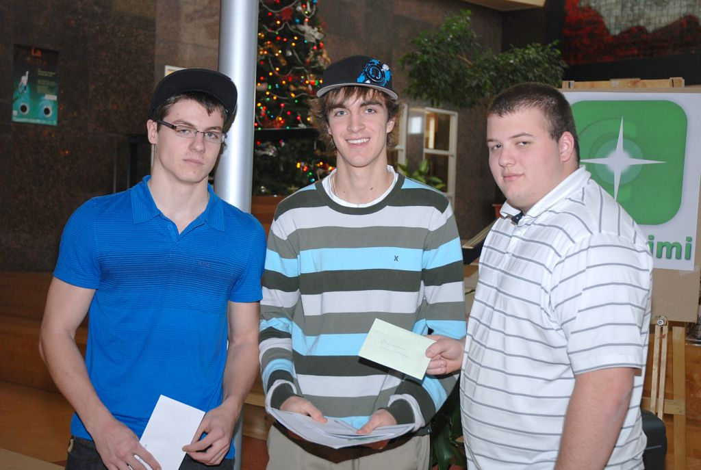 Photo d'une remise de prix à des étudiants en astronomie du Cégep de Chicoutimi pour leur participation au Projet:Cégep de Chicoutimi. Les détails sont disponibles dans un article de l'Idéephile (p. 7).